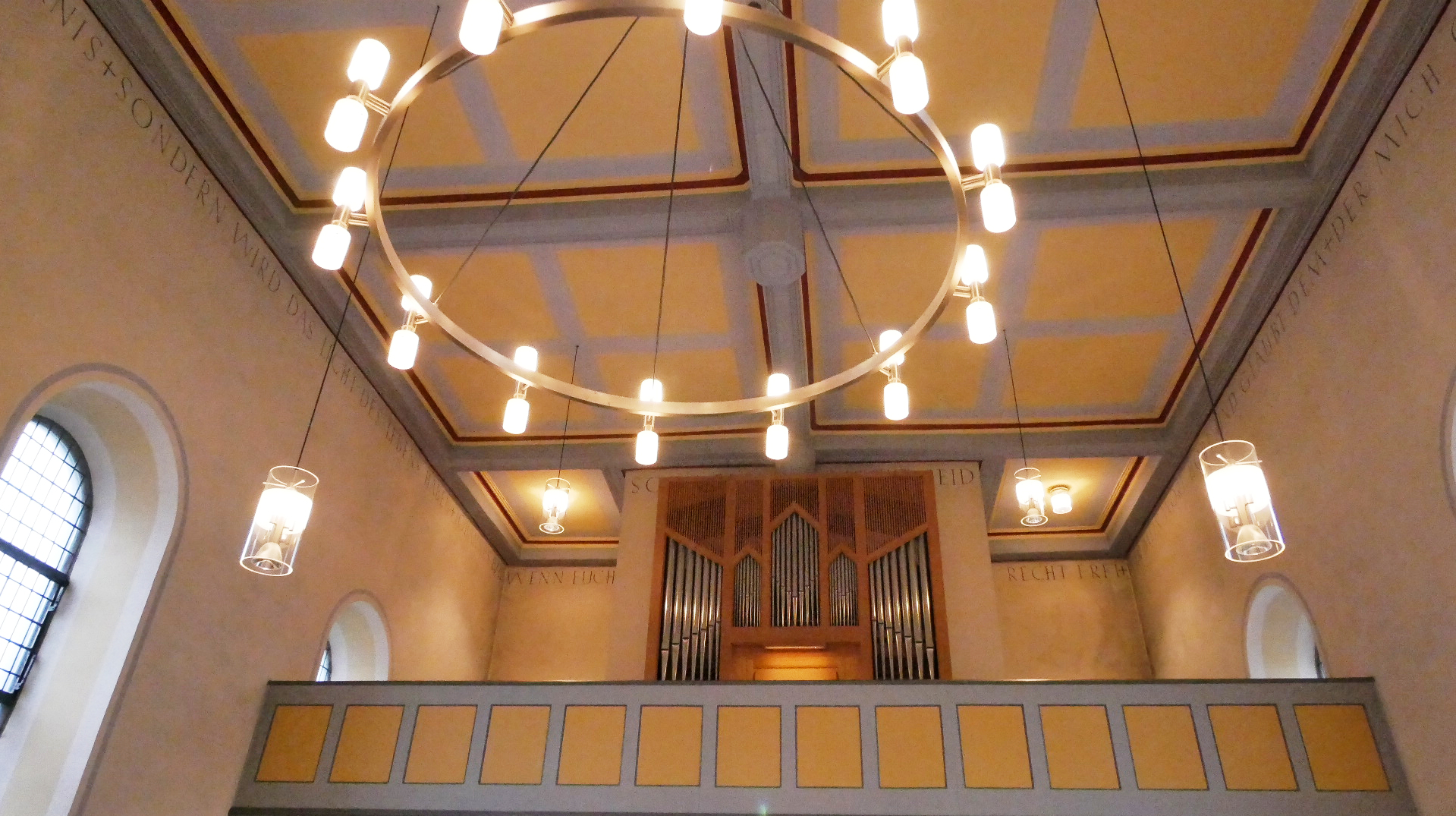 Evangelische Kirche Hermeskeil Orgel Decke und Deckenleuchter